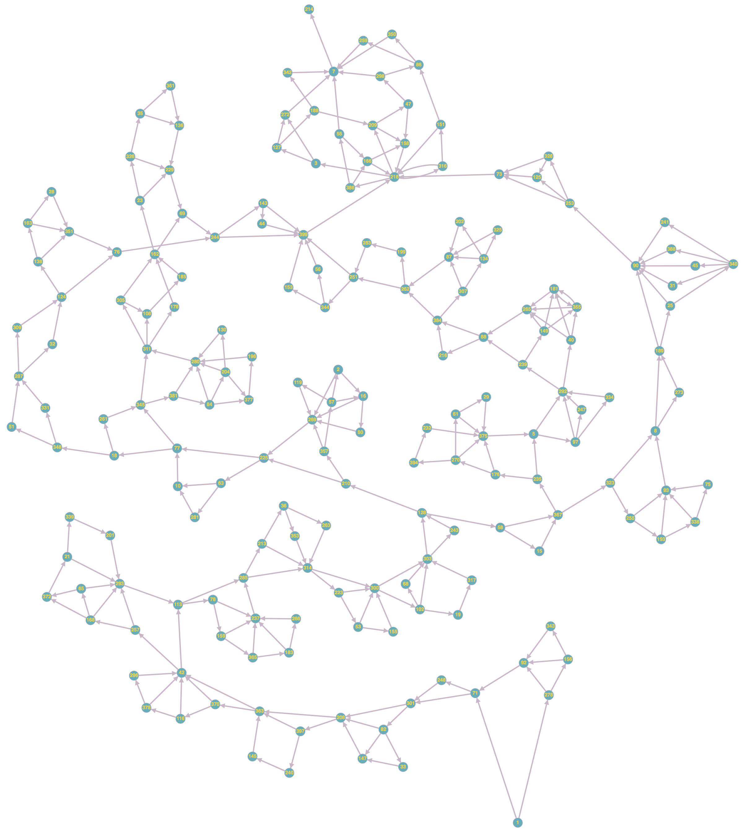 Graphe obtenu via qui représente la structure de la première partie du Sorcier de la montagne de feu.